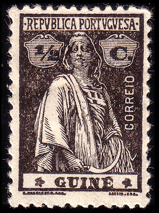 Timbre de l'Guine, colonie portugaise, à l'effigie de la déesse Cérès, en usage des années 1910 aux années 1930, 0,5 centavos